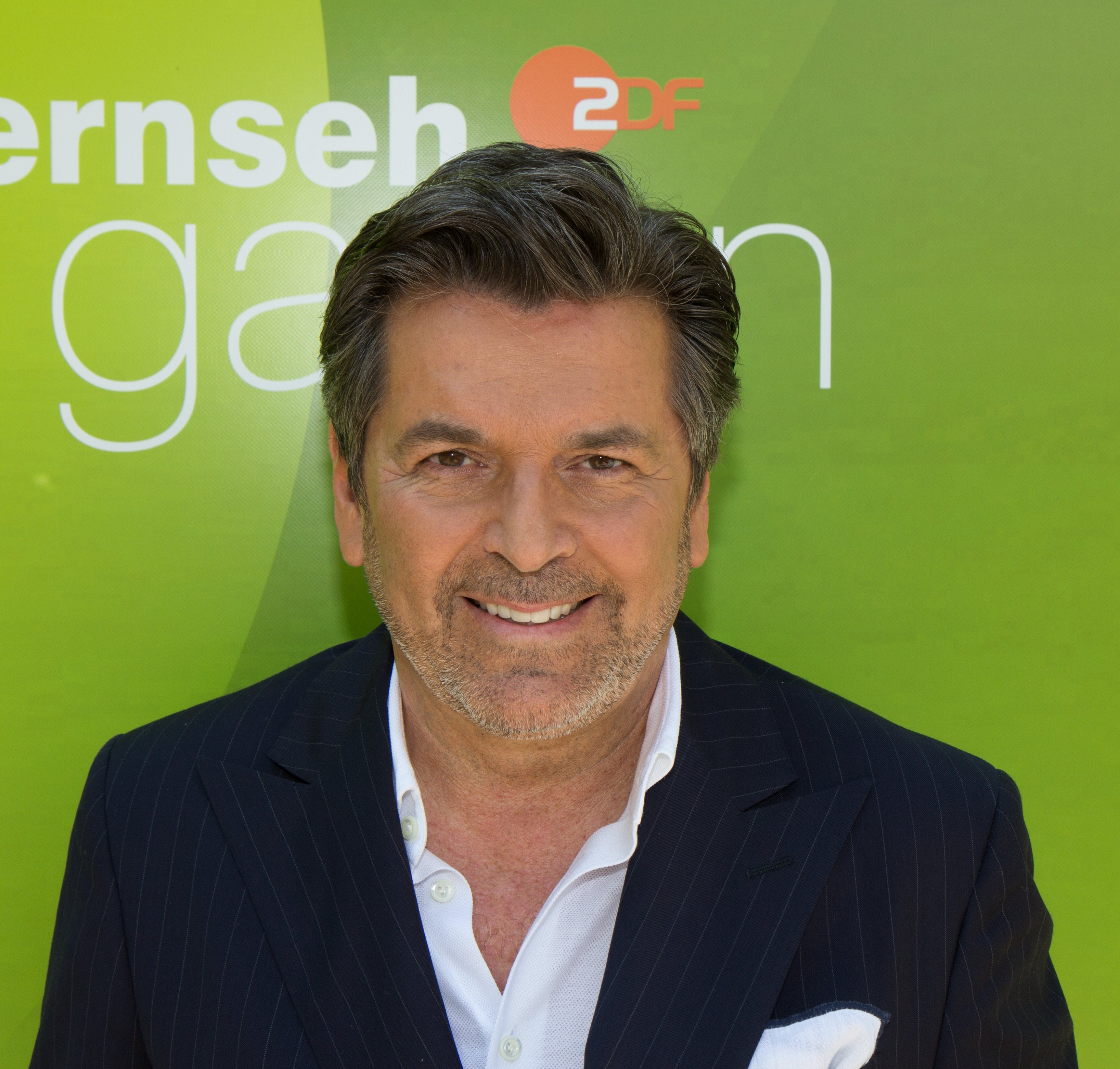 Thomas Anders als Gast beim ZDF-Fernsehgarten am 10. Juni 2018 in Mainz.